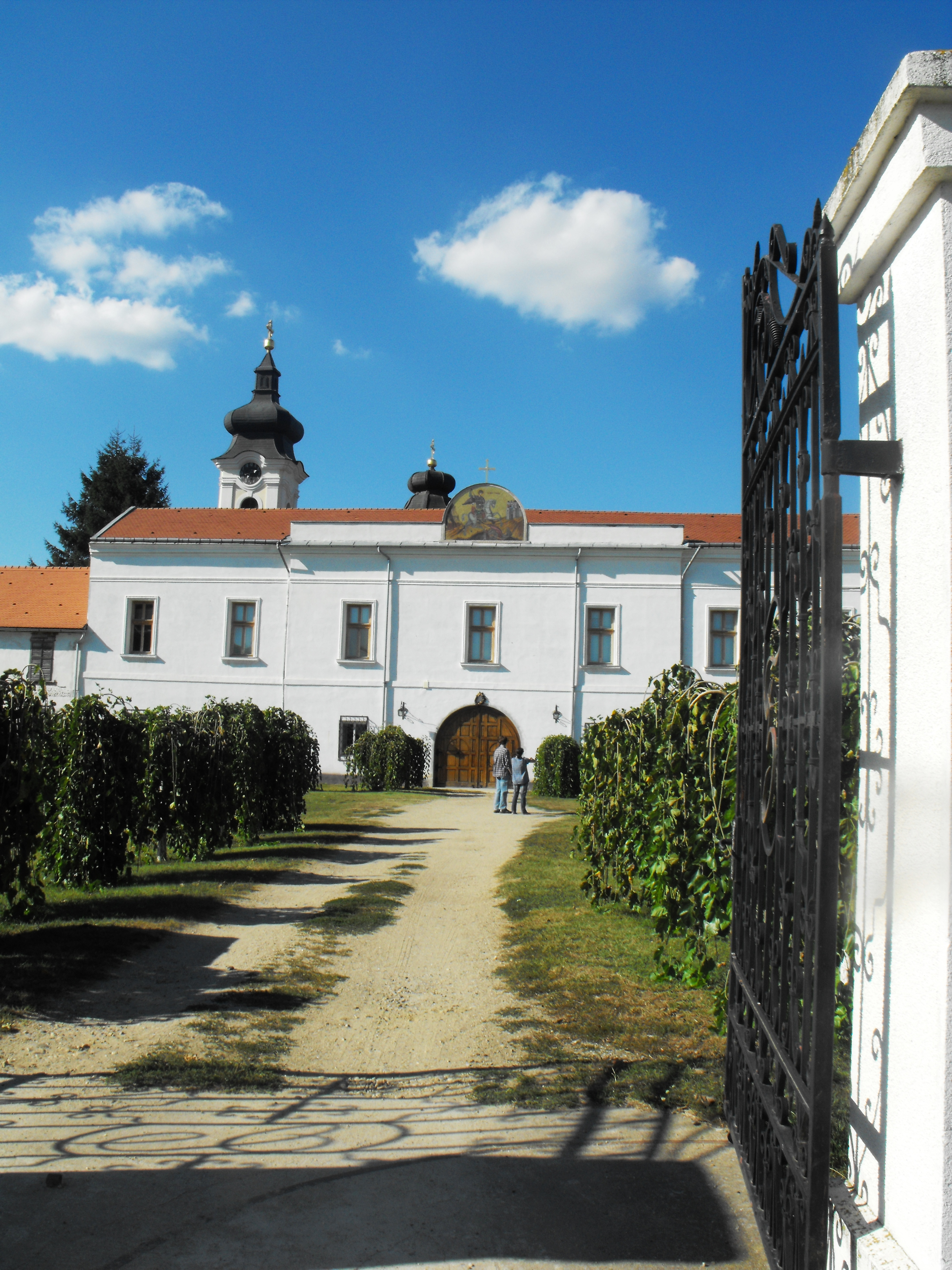 Mânăstire din sec. XV, de rit ortodox sârb, având fortificaţii similare cu cele ale mânăstirilor din Nordul Moldovei ridicate de Ştefan cel Mare în aceeaşi perioadă